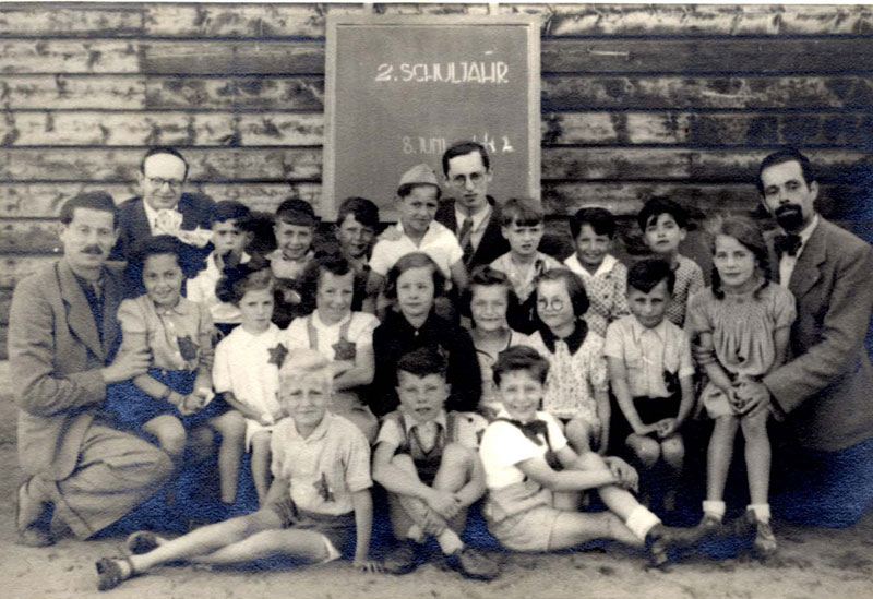 Westerbork, a school in the camp